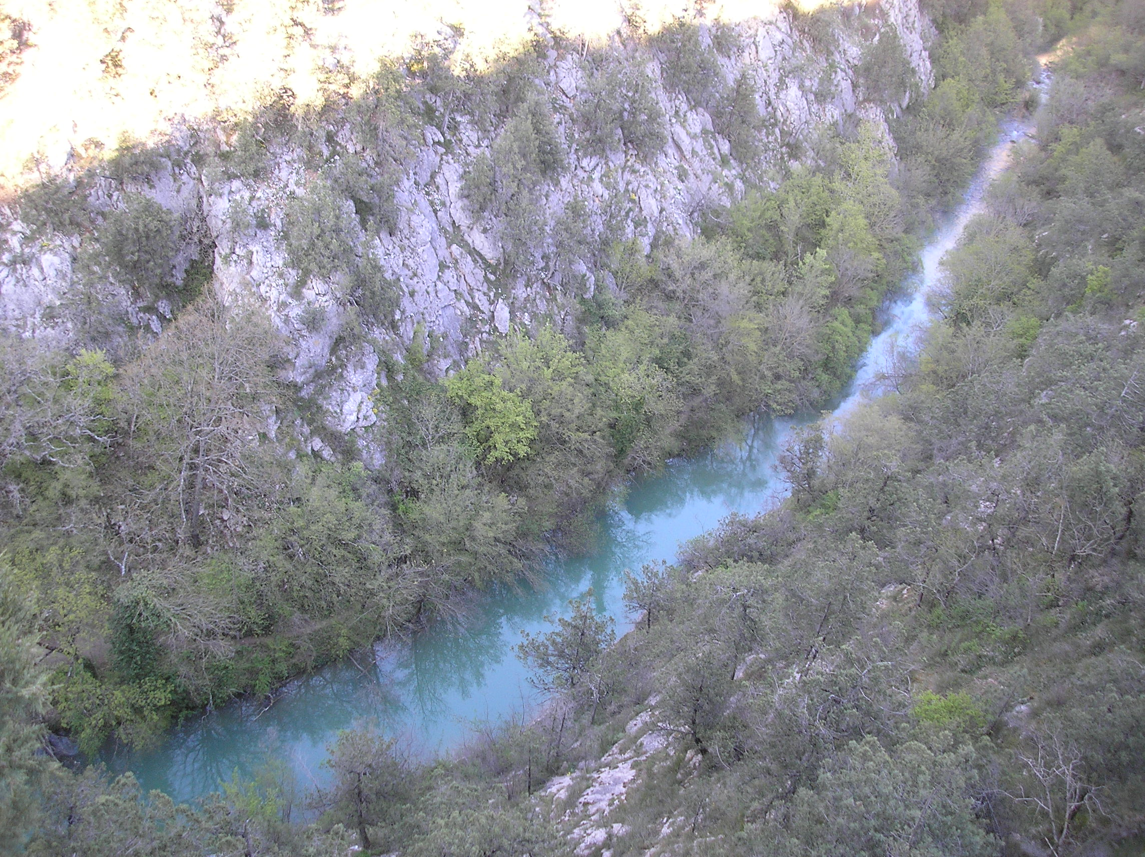 Річка Чорна